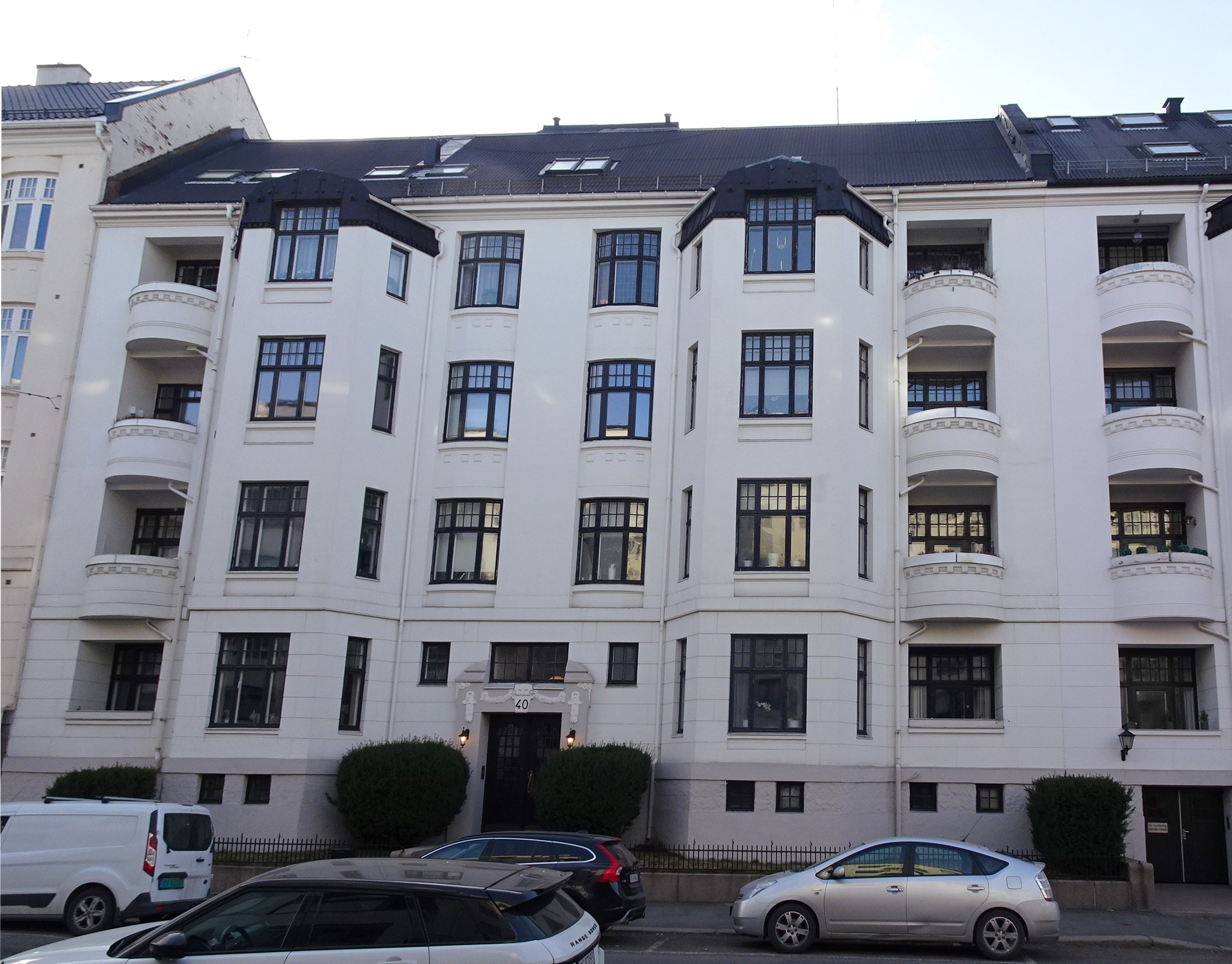 Frederik Stangs gate 40. Arkitekt: Syver Nielsen.